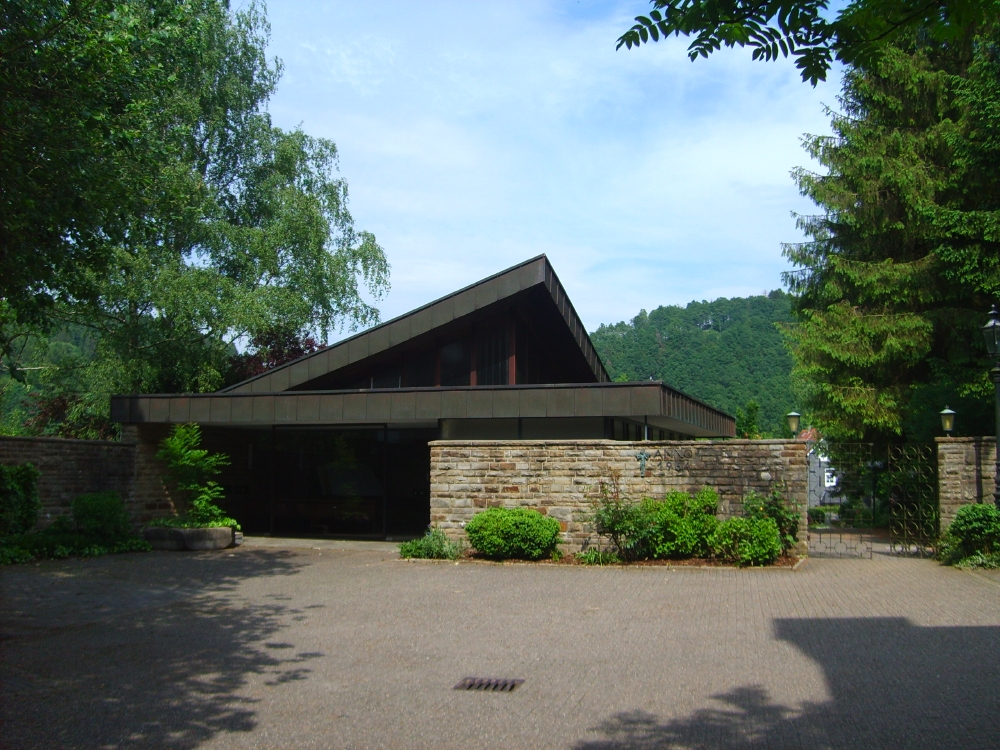 Friedhofskapelle katholischer Friedhof Beyenburg, Wuppertal, Germany